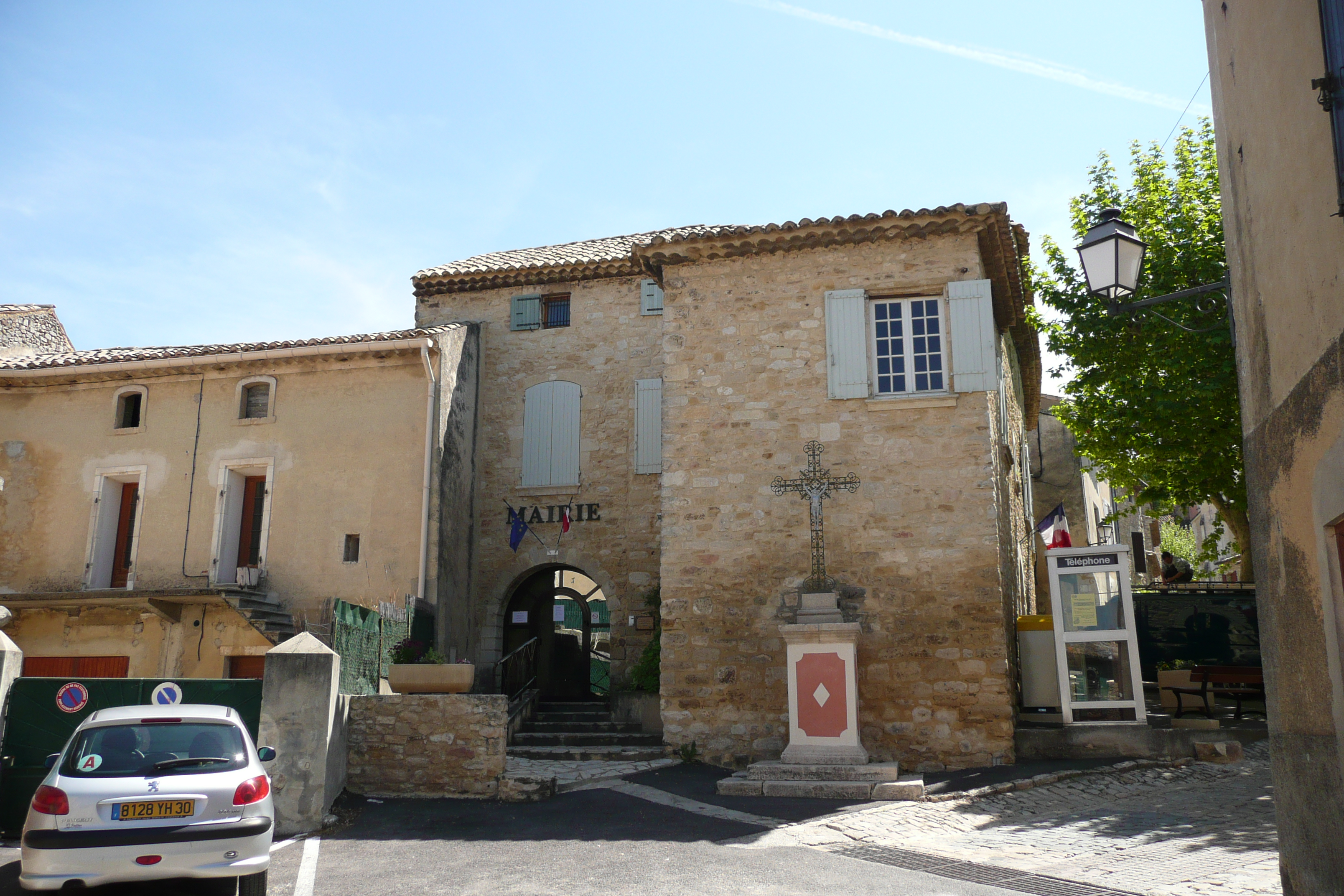 Mairie à Vénéjan.